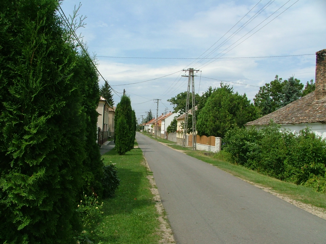 Az evangélikus templom utcája Nemeskér ban.